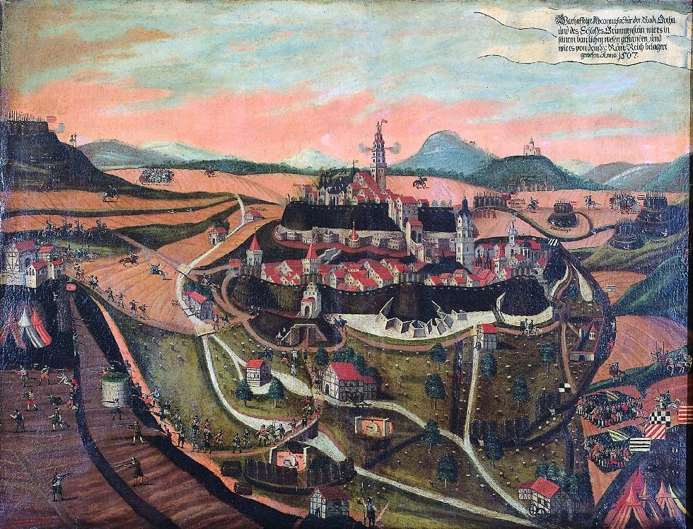 Belagerung der Stadt Gotha und der Festung Grimmenstein um die Jahreswende 1566/67. 2. Hälfte 16. Jahrhundert